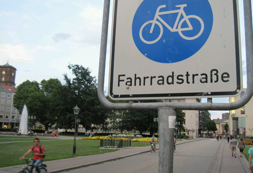 net. Taken in Karlsruhe, Germany.